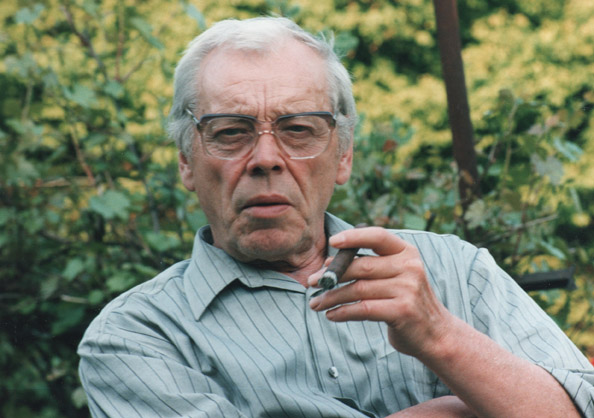 Bernard Ładysz (1922-2020), śpiewak operowy.